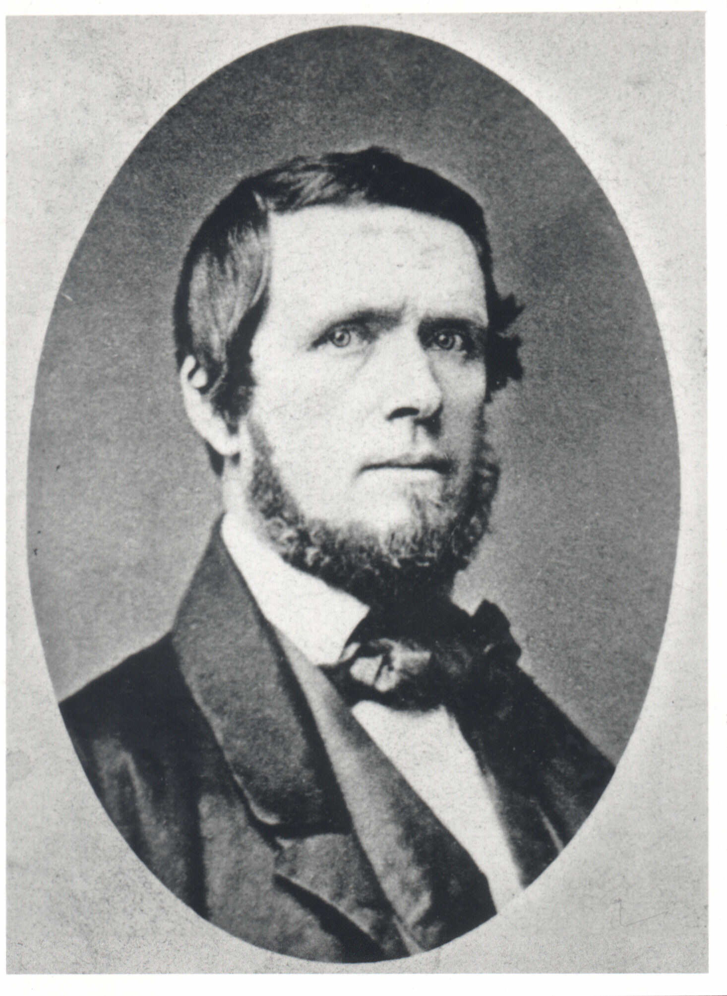 Porträtfoto von Wilhelm Weitling. Wilhelm Weitling starb am 25. Januar 1871, das Bild ist also in jedem Fall älter als 100 Jahre. Wilhelm Weitling starb am 25. Januar 1871, das Bild ist also in jedem Fall älter als 100 Jahre